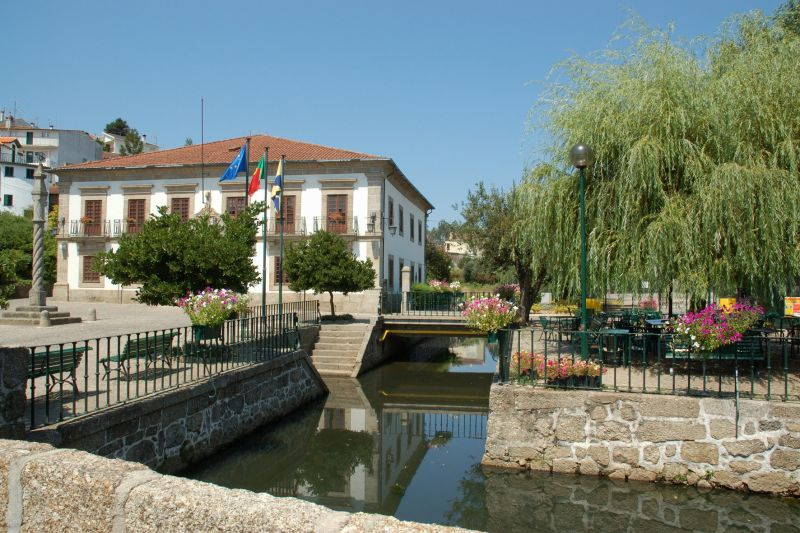 Cidade de Santa Comba Dão